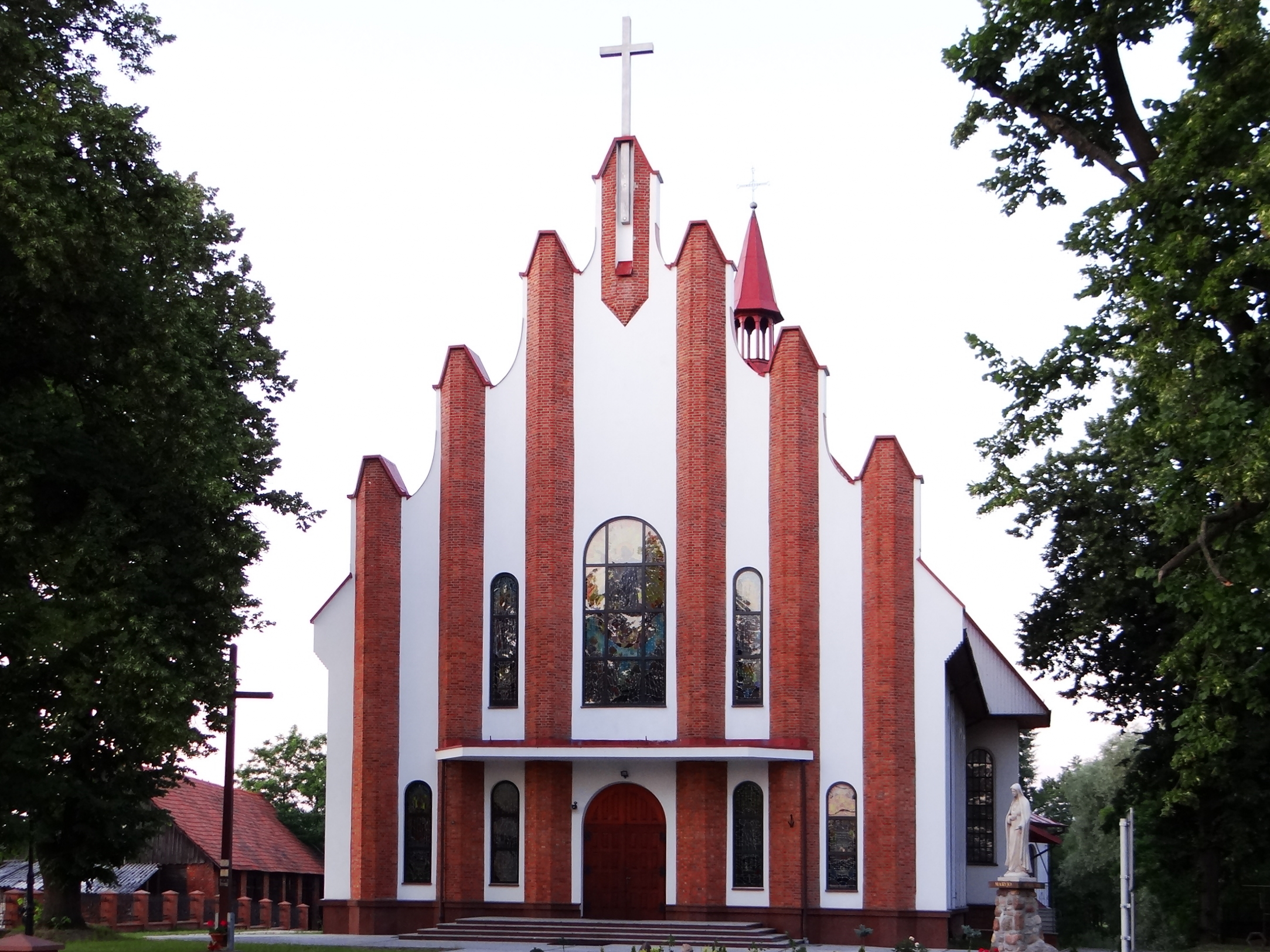 Zdjęcie wykonane w miejscowości Racławice. powiat niżański.